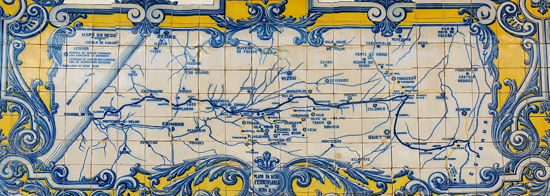 Painel de azulejos localizado na estação de Vilar Formoso representando um plano da Rede Ferroviária da Beira Alta